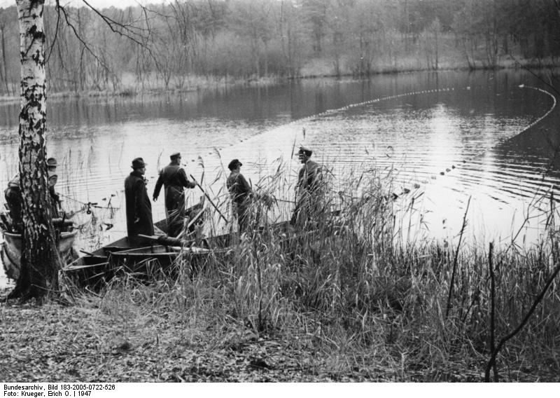 Mark Brandenburg, Fischfang Fischfang in der Mark Brandenburg 1947. Das ausgefahrene Netz wird langsam eingebracht Illus/Krueger 426-47